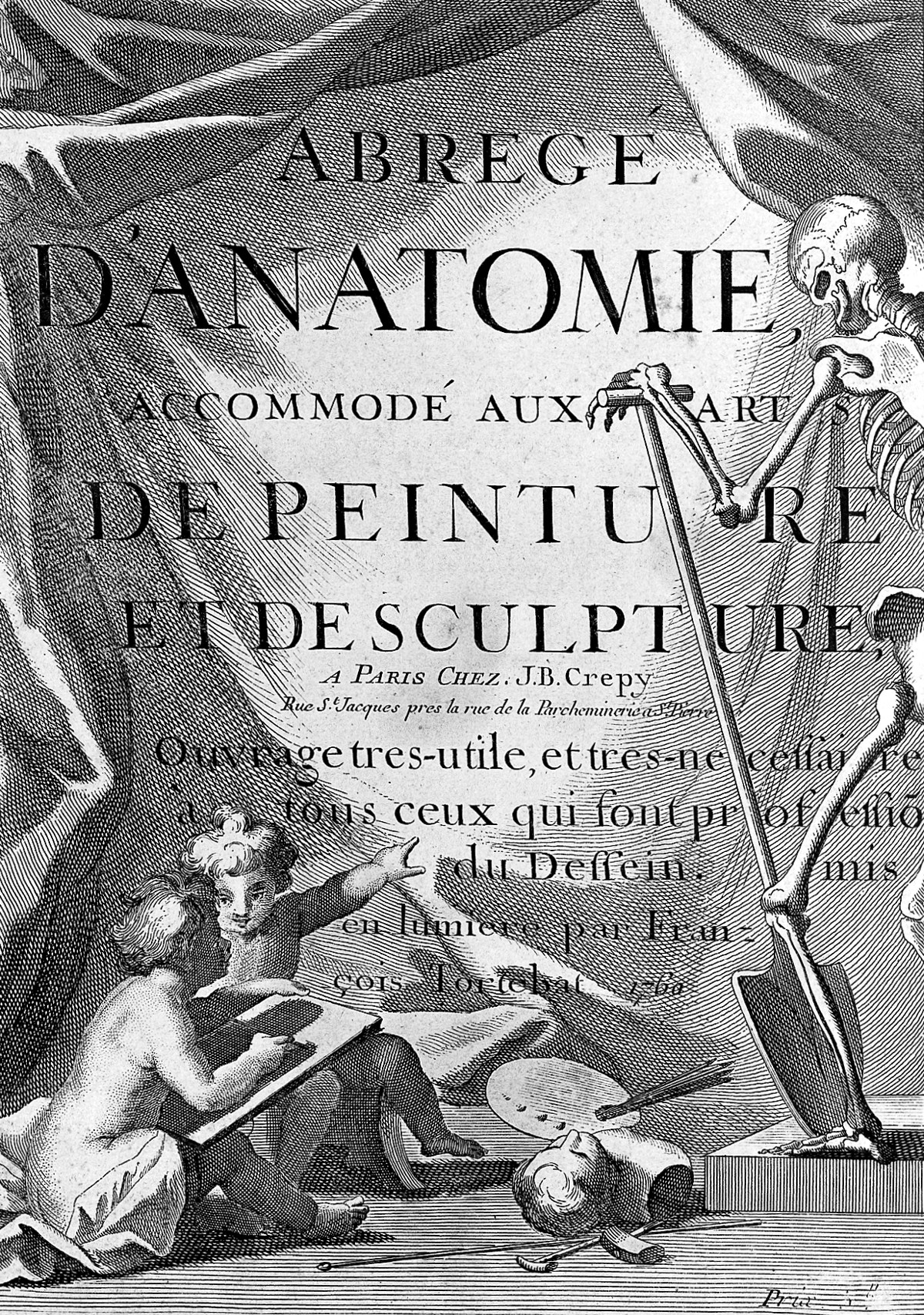 Title page Rare Books Keywords: Roger de Piles